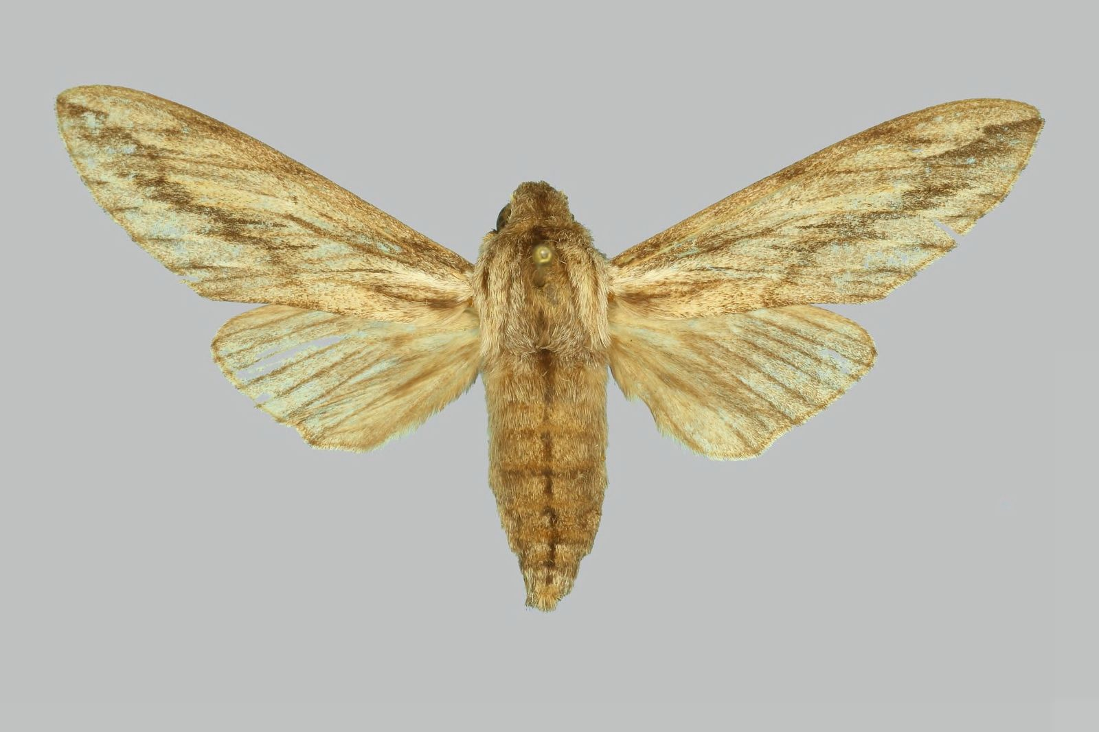 Litosphingia corticea, male, upperside. Mozambique, Amatongas, Manica